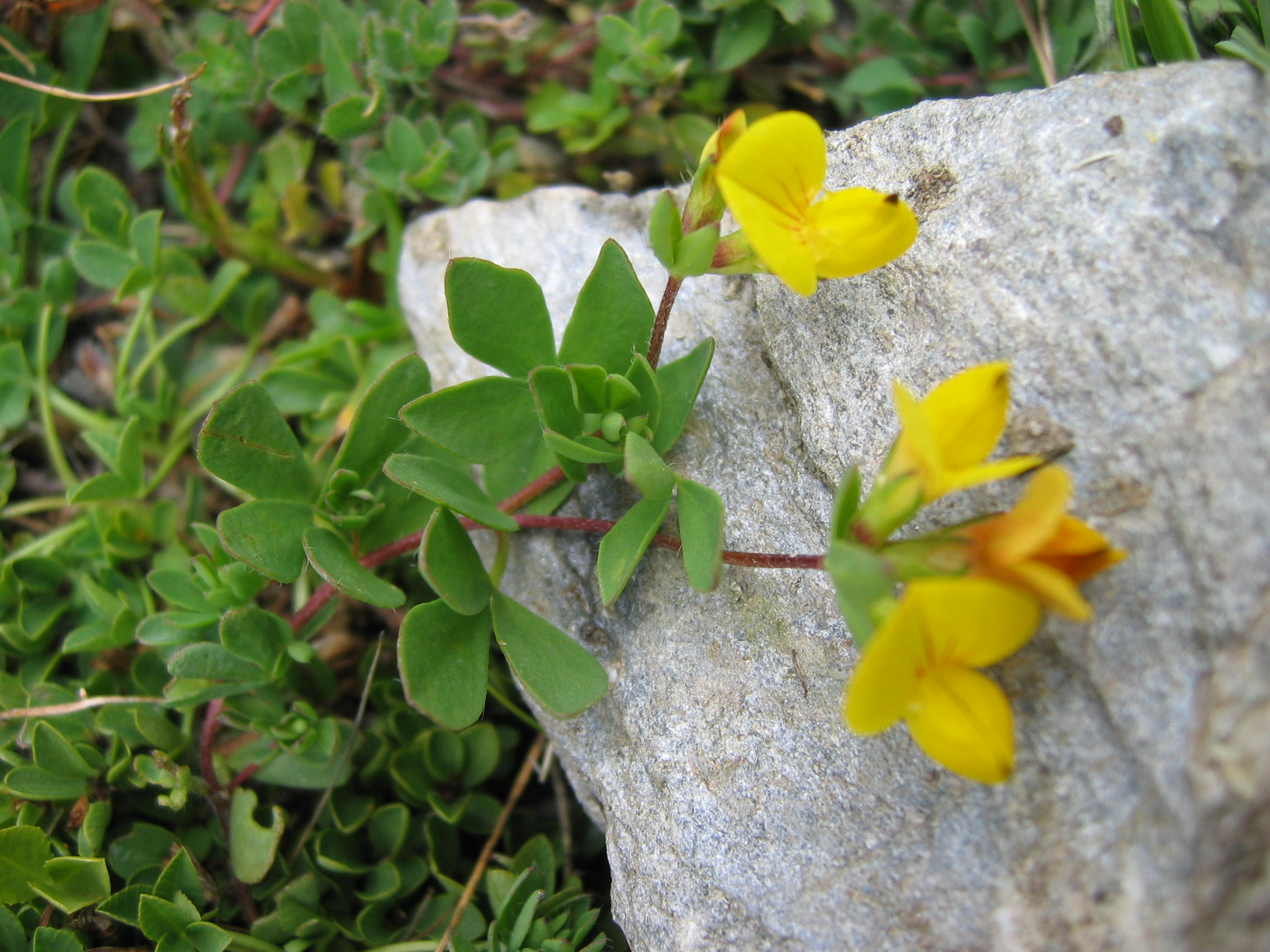 Lotus alpinus : Tour de la tête des Toillies au départ de Saint Véran - (Queyras, France)